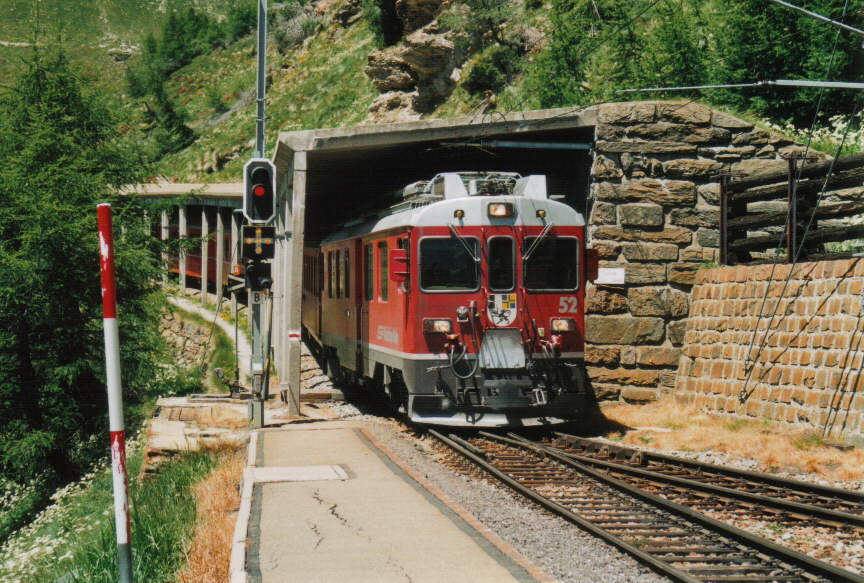 Einfahrt des aus St. Moritz kommenden ABe 4/4 III 52 in Alp Grüm, Juni 2003. Aufnahme: Reiner Günther, Seelingstädt Upload genehmigt an: Steffen Mokosch Lizenz: GNU FDL